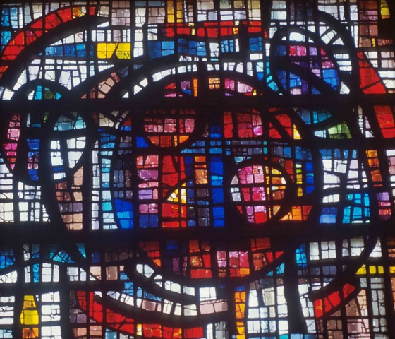 Vetrata in Dalles (vetro spesso) del maestro Ernesto Tross